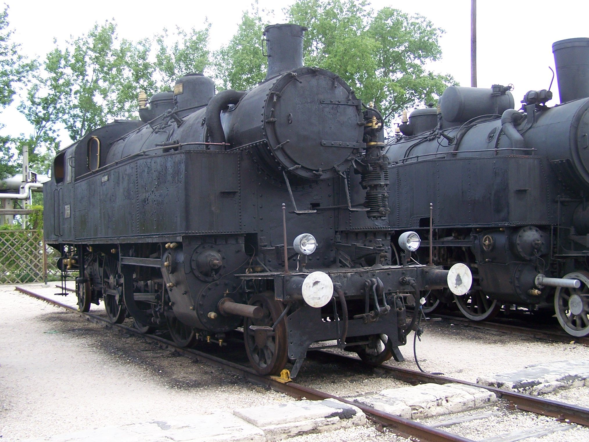 MÁV 342 a Füsti vasúttörténeti parkban